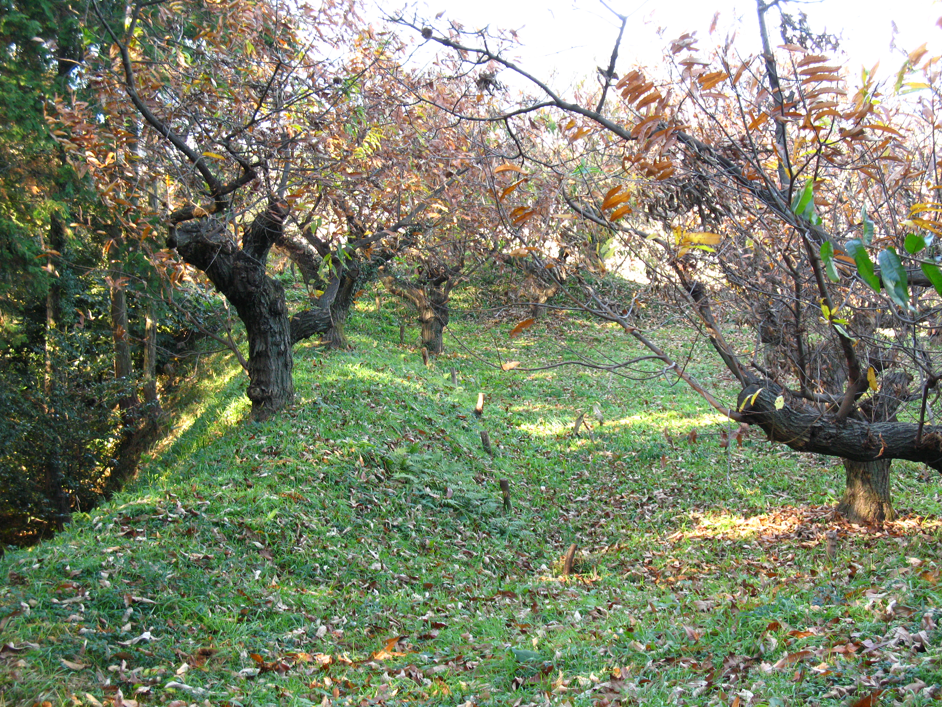 Nishikawa-jo site